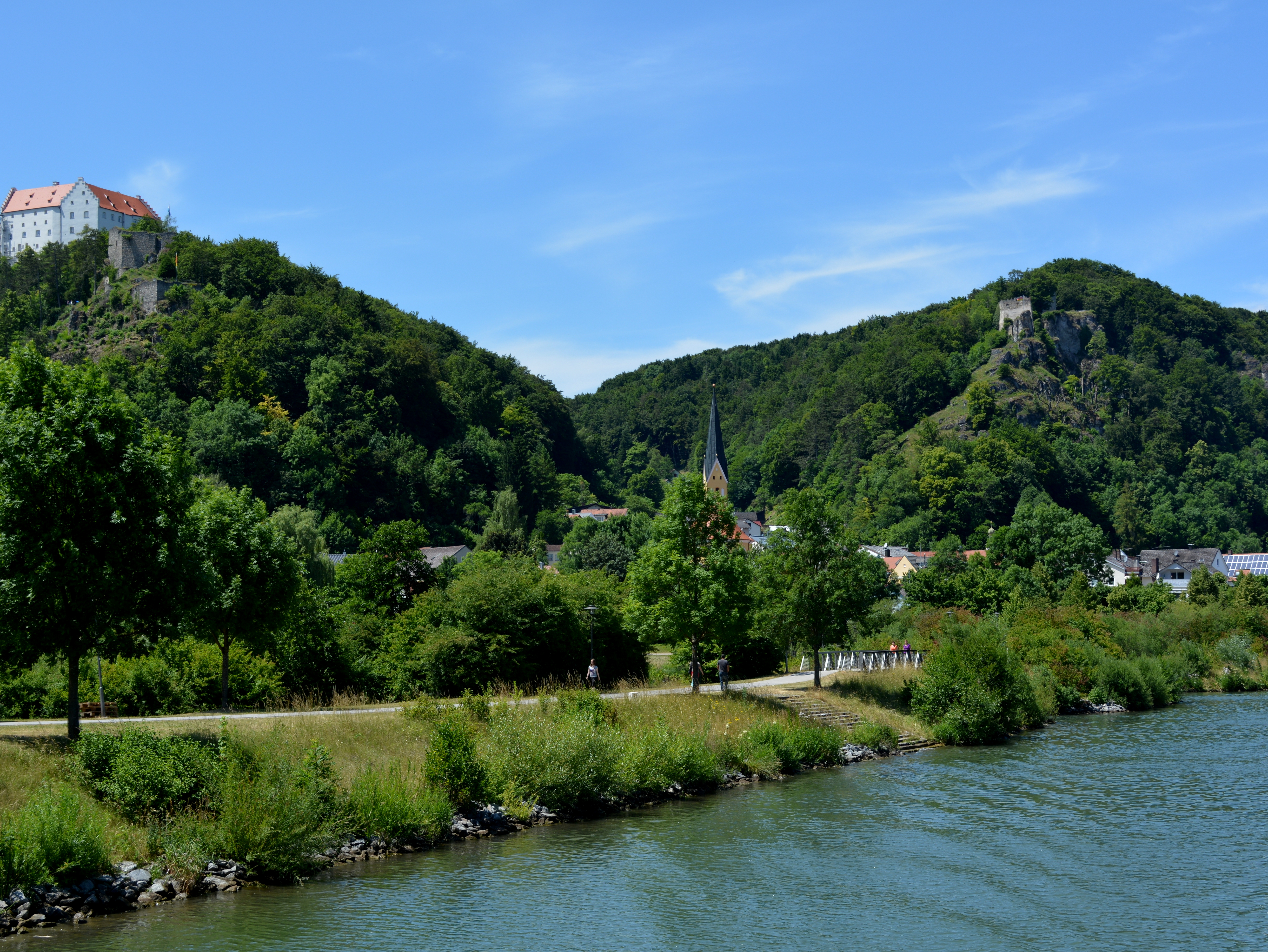 Die Rosenburg ist eine Felsburg im Altmühltal, Landkreis Kelheim. Gegenüber thront auf einem Dolomitfelsen die Ruine Tachenstein. Der Rosenburg und der Ruine Tachenstein zu Füßen liegt der Ort Riedenburg.